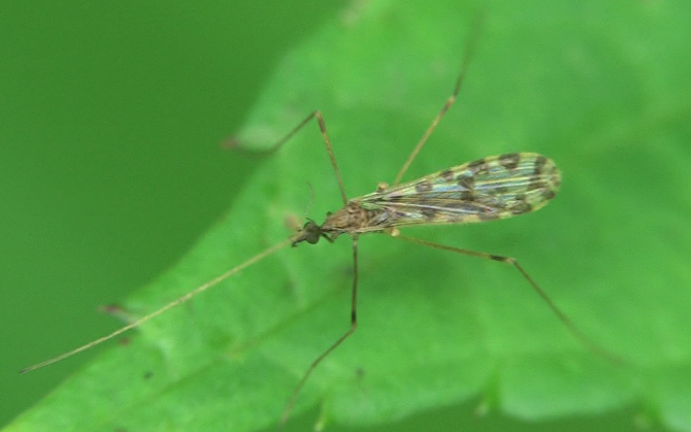 Ilisia maculata